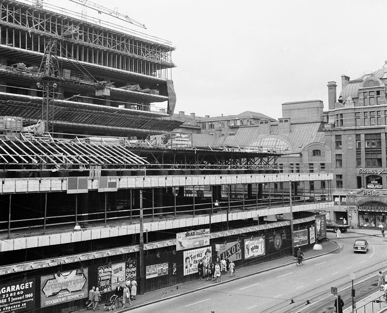 Vasahuset uppförs i kvarteret Kortbyrån i Stockholm